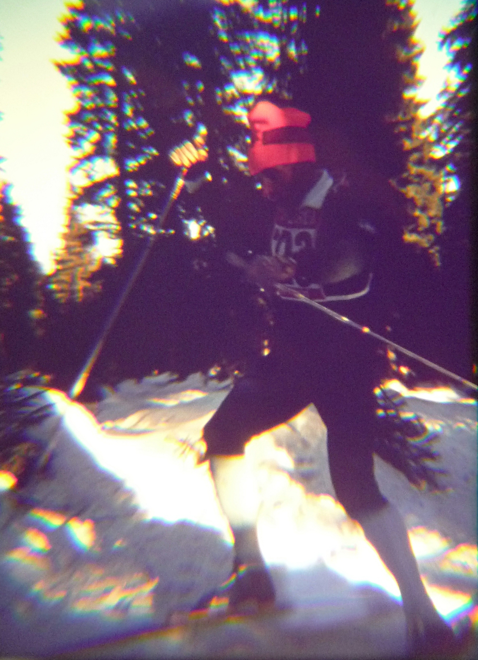 Walter Demel Anfang 1973 am Bretterschachten, Bayerischer Wald